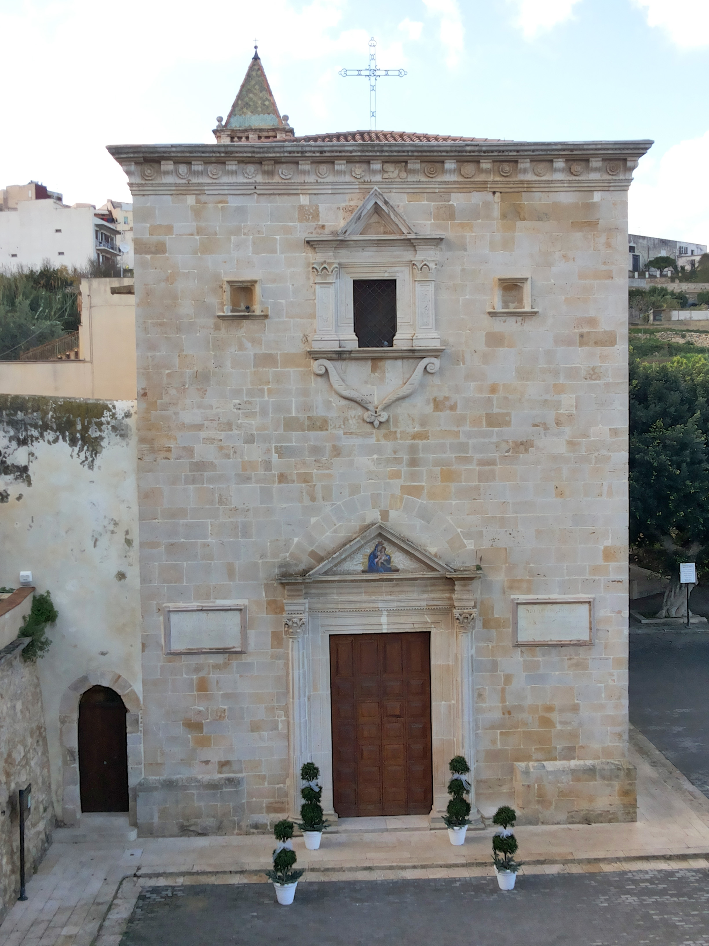 Santuario della Madonna dei Miracoli (Alcamo) - Facciata